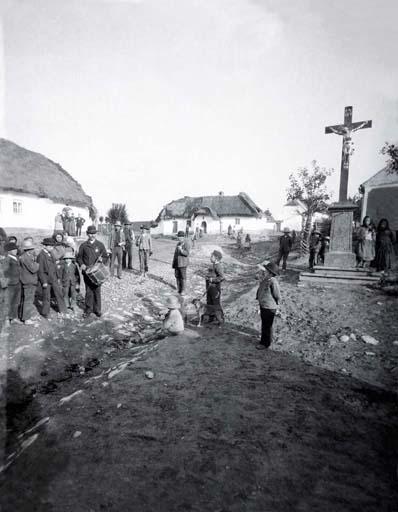 Česky: Vyvolávač na návsi (Čechyně)